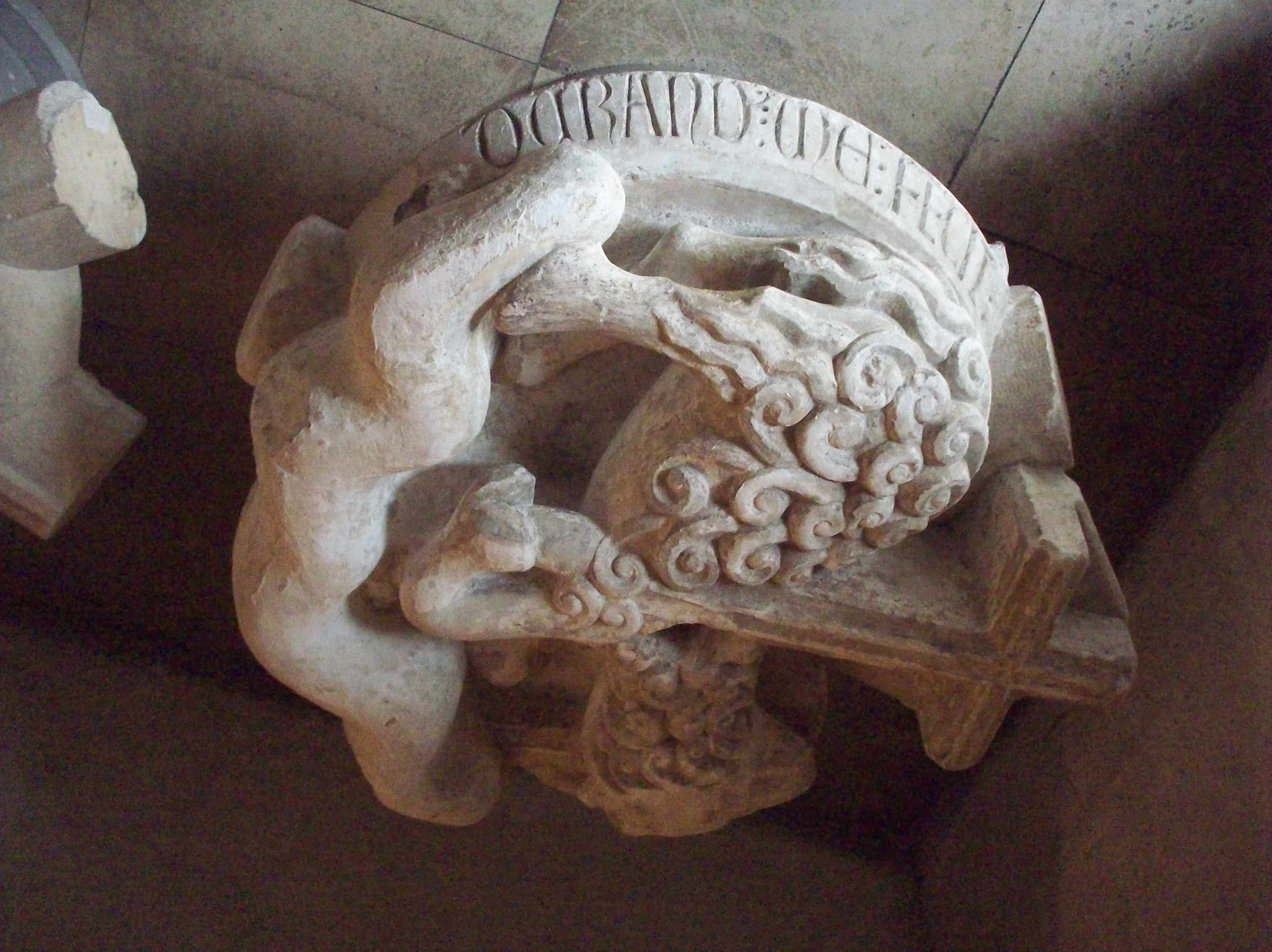 Dernière clef de voûte de la nef de la cathédrale de Rouen, elle est sculptée d'un agneau pascal surmonté d'une croix et signée « Durandus me fecit »